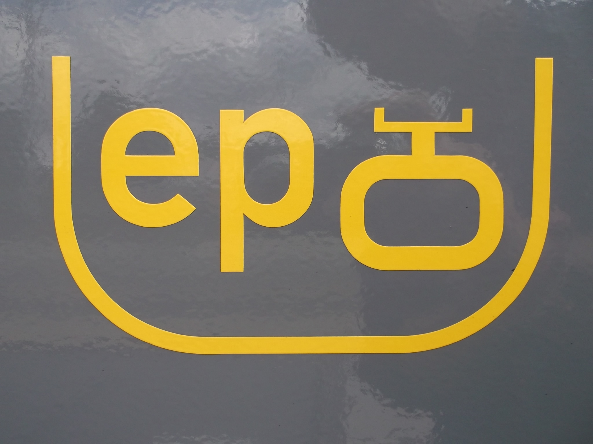 Bremsanschrift Notbremsüberbrückung und Steuerung der elektropneumatischen Bremse eines Eisenbahnfahrzeuges der Deutschen Bahn - Steuerung über neunpolige EBAS-Steuerleitung nach UIC 541-5